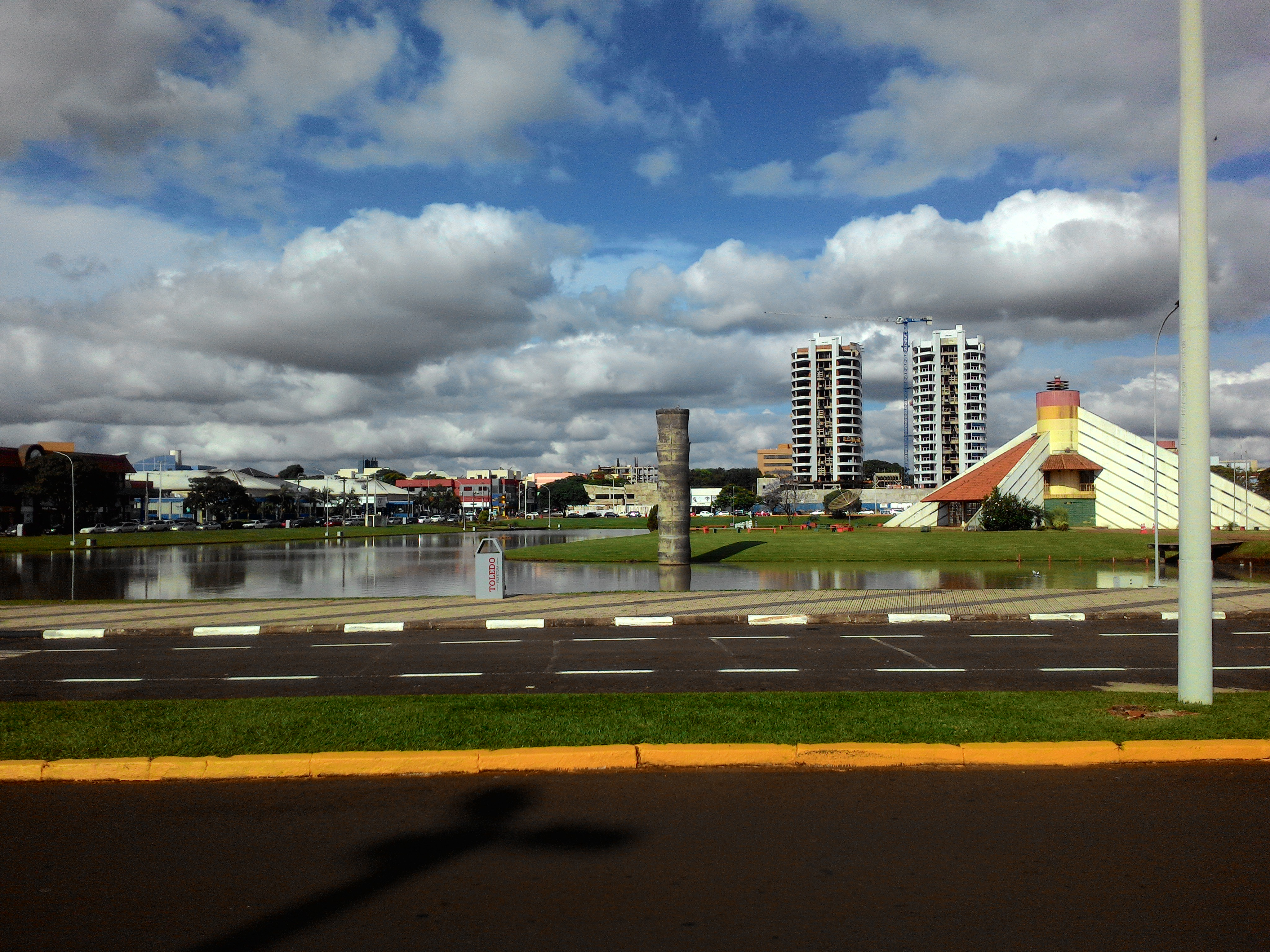 Parque Ecológico de Toledo, no Oeste do Paraná.